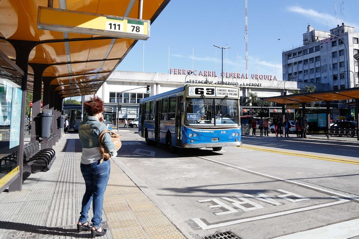 Centro de Trasbordo Federico Lacroze